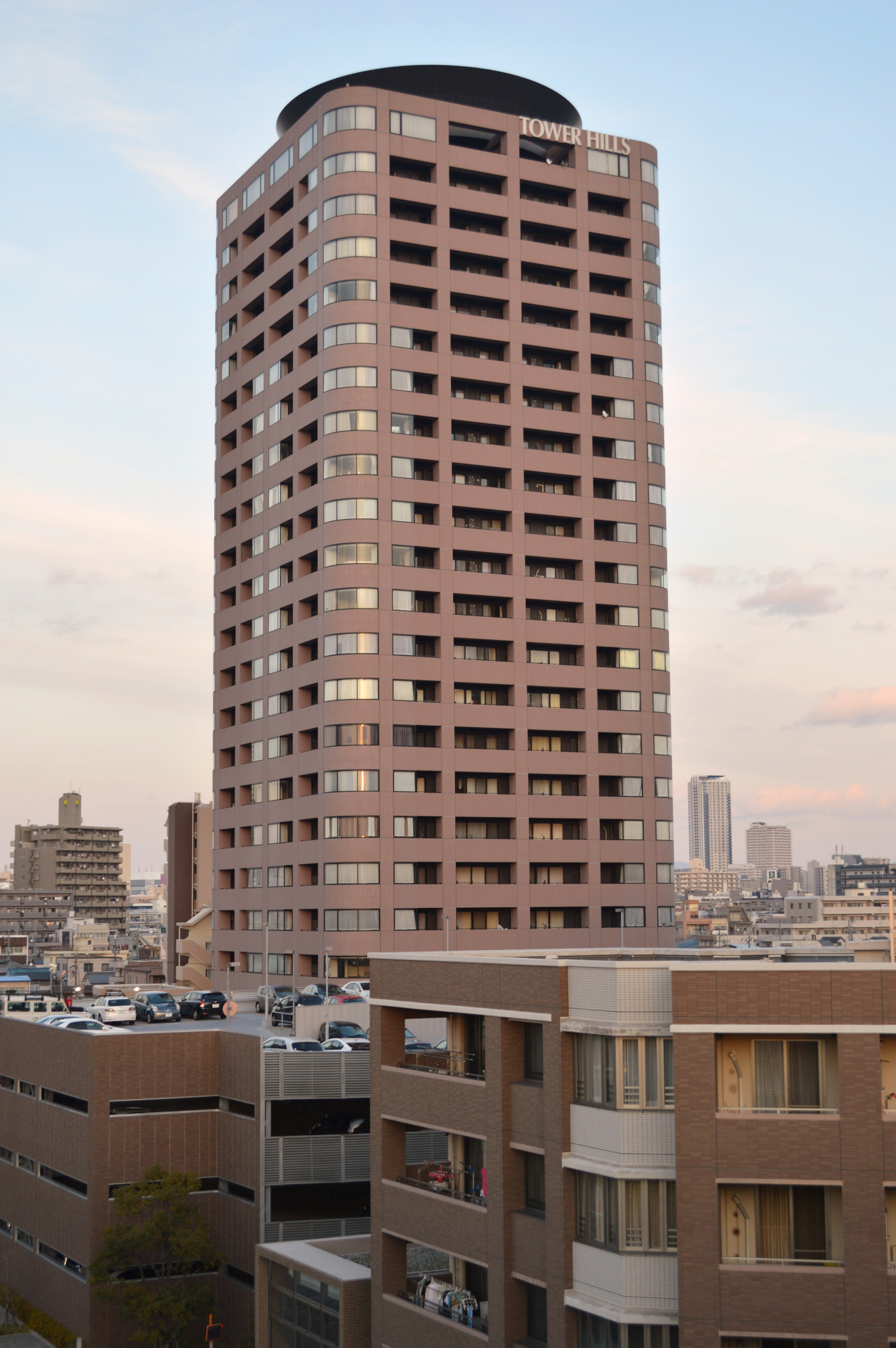 愛知県名古屋市千種区千種にある高級賃貸マンション「千種タワーヒルズ」